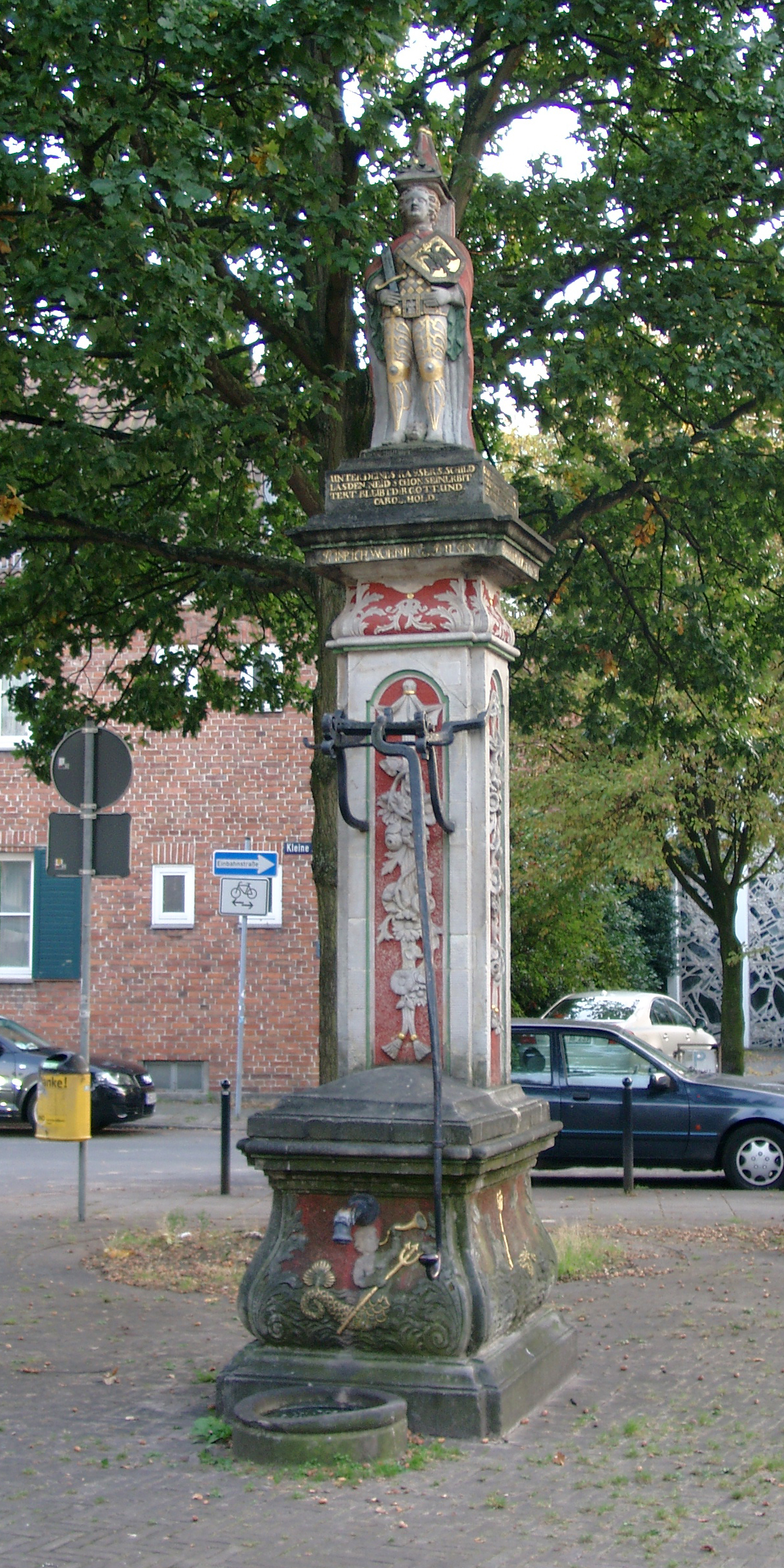 Kleiner Roland, Am Neuen Markt, Bremen, Germany Das abgebildete Objekt ist ein geschütztes Kulturdenkmal in der Freien Hansestadt Bremen, mit der Nr. 0075 beim Landesamt für Denkmalpflege registriert.